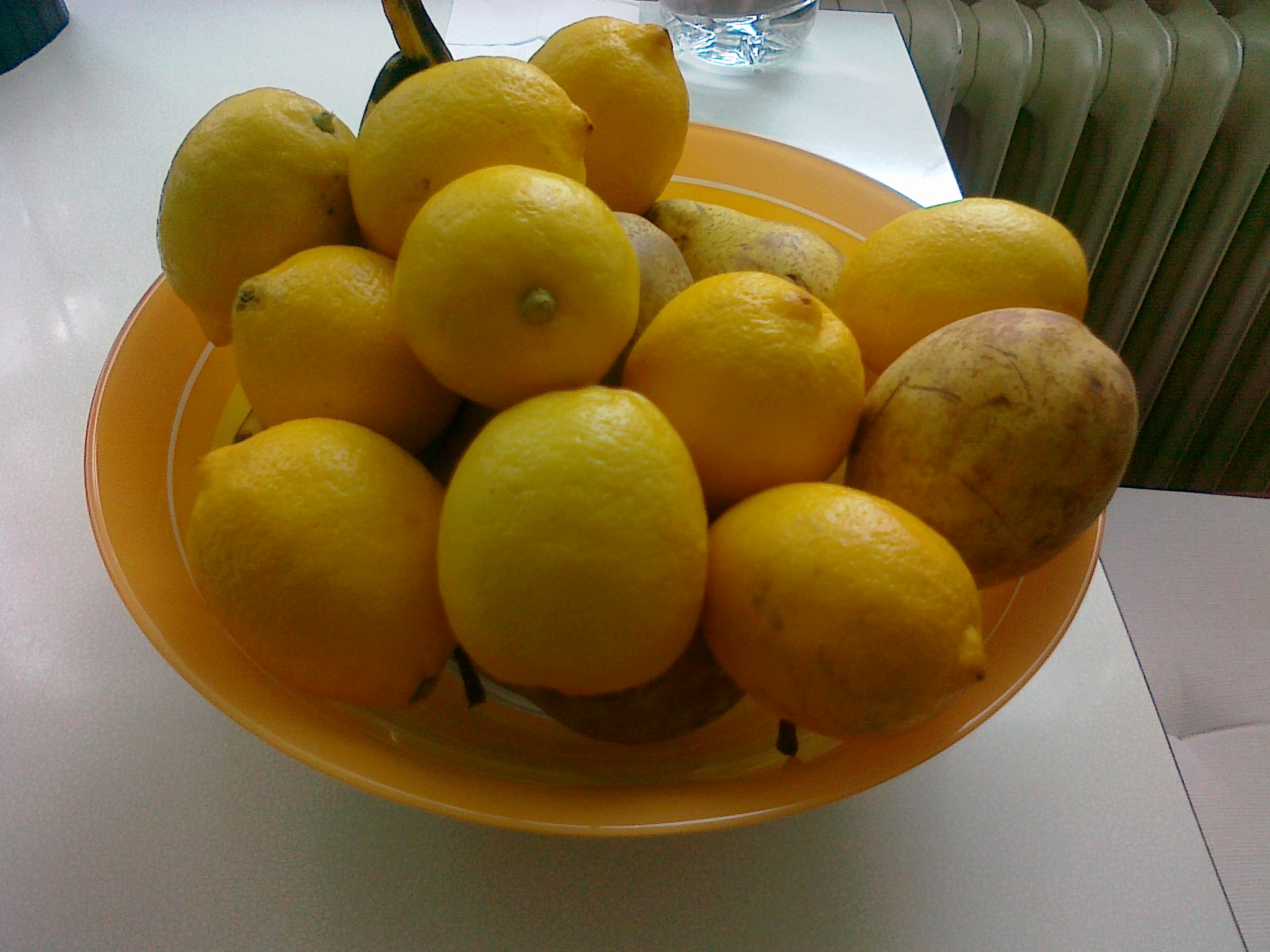 Slika predstavlja limone, ki so bile po obiranju obdelane z imazalil-om